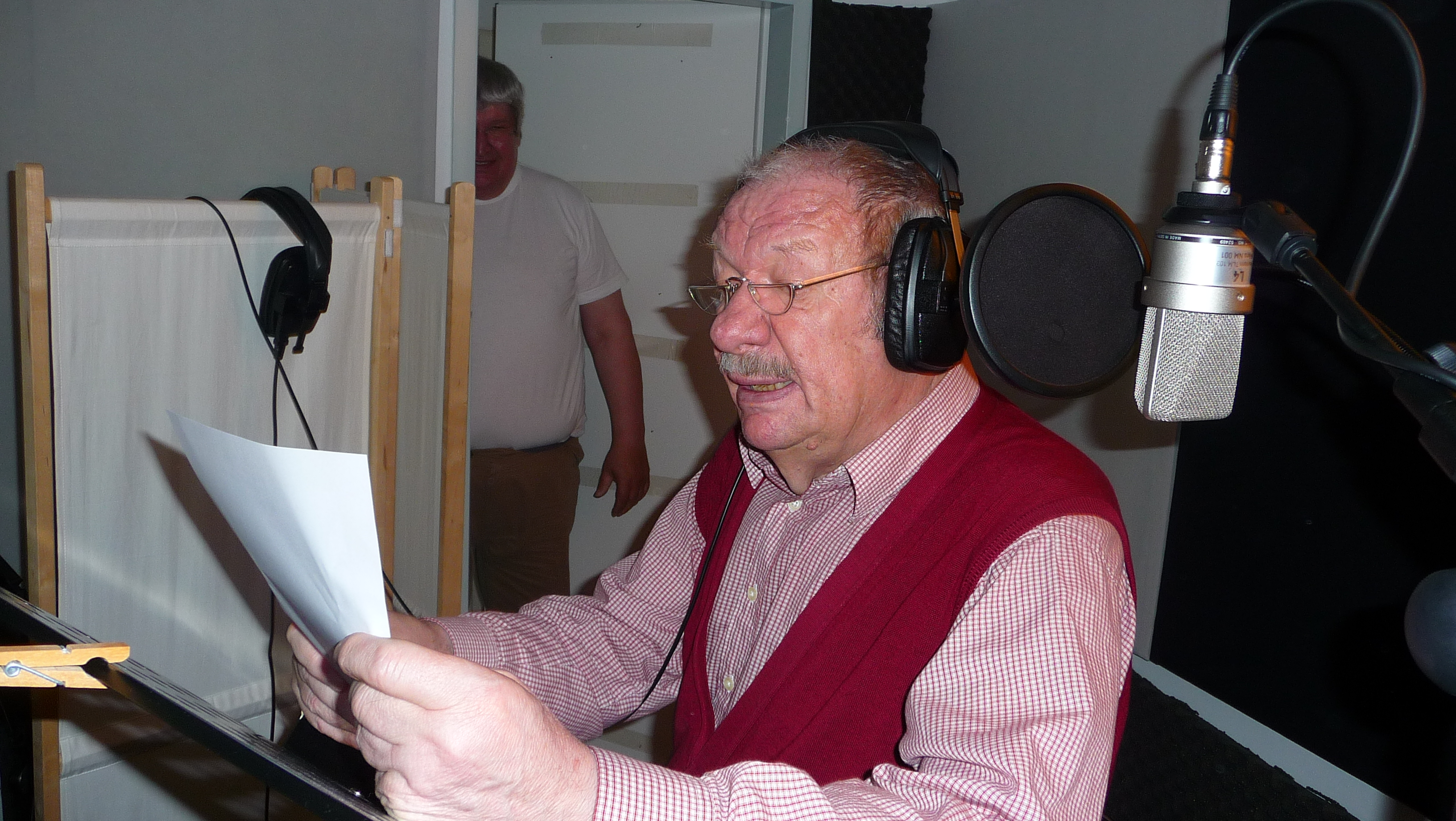 Wolfgang Völz beim Synchronisieren des Films Der Gründer; im Hintergrund Helmut Krauss